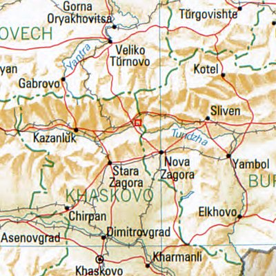 Twardiza - Lage des Ortes in Bulgarien